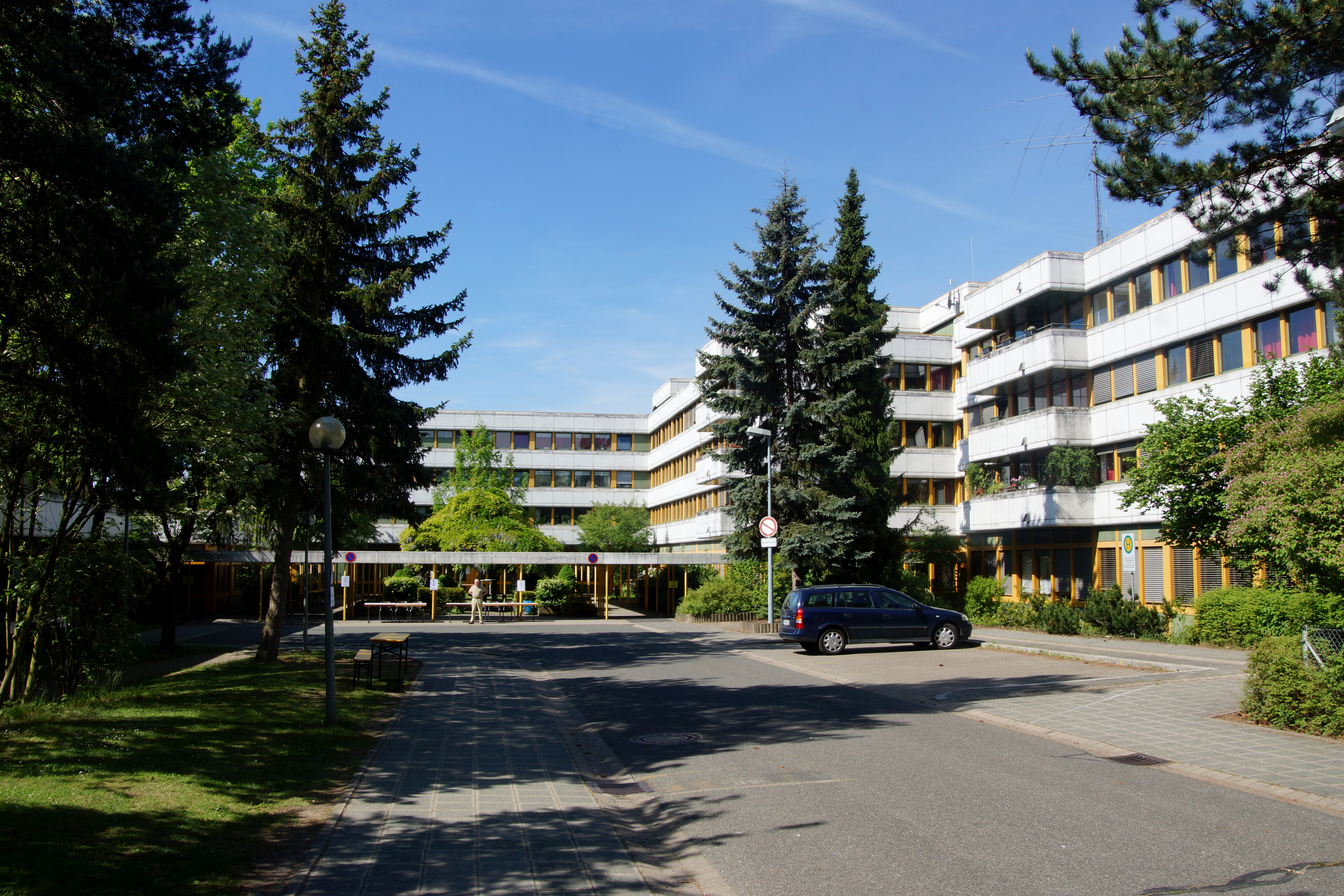 Das Blindeninstitut in Nürnberg in der Brieger Straße